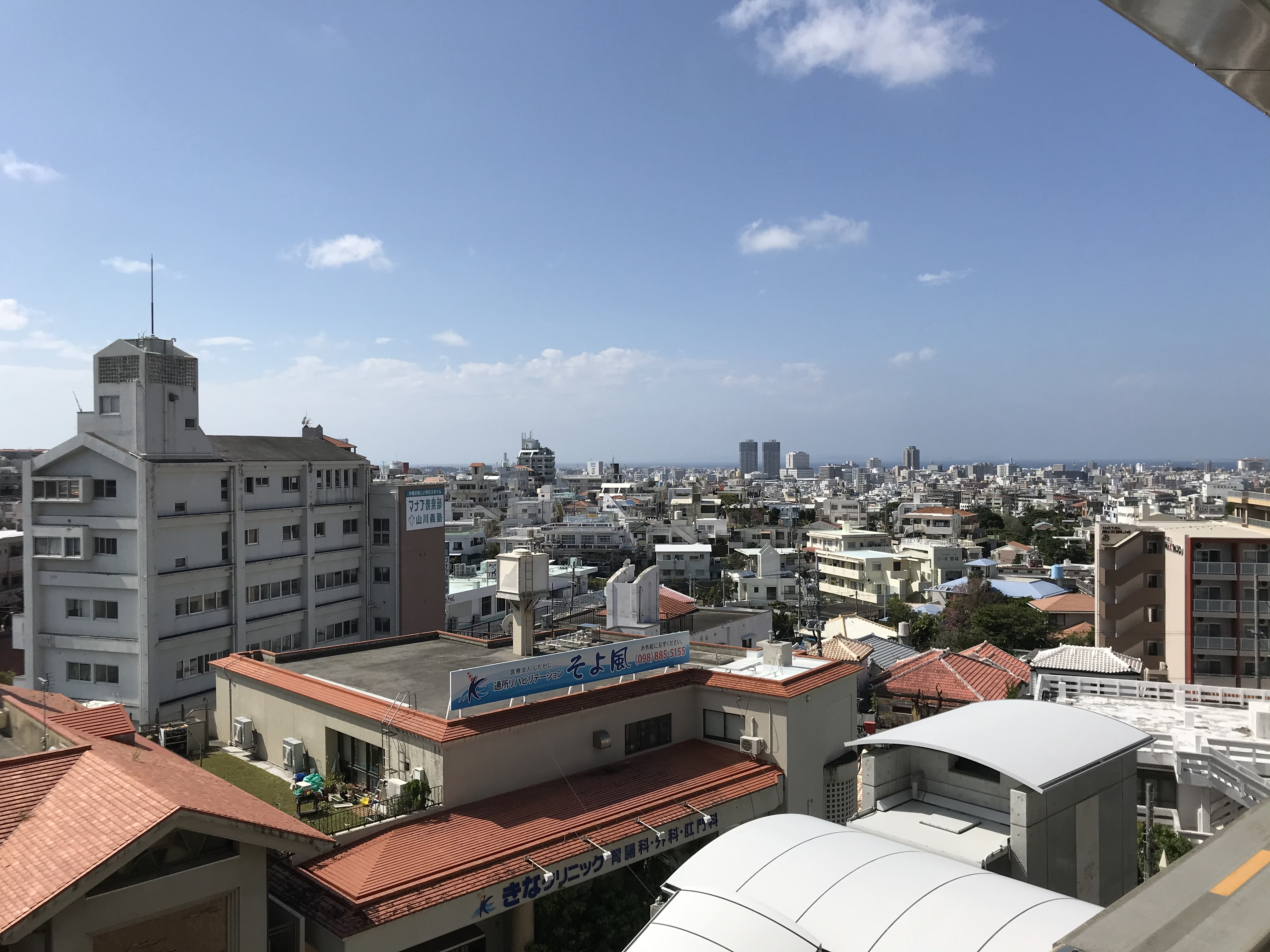 沖縄都市モノレール（ゆいレール）儀保駅ホームから見た那覇市街